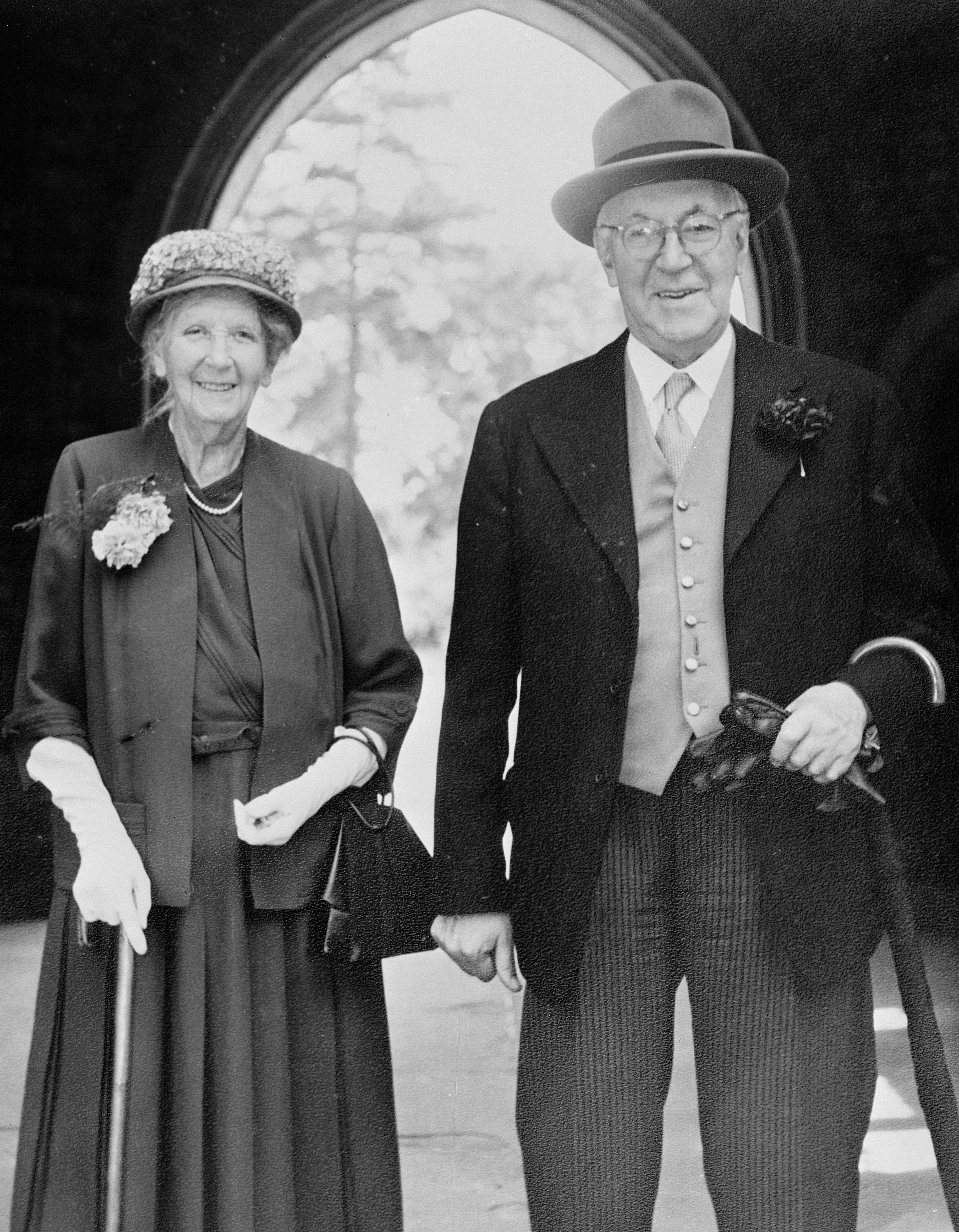 Lady and Sir Henry Dale at a wedding